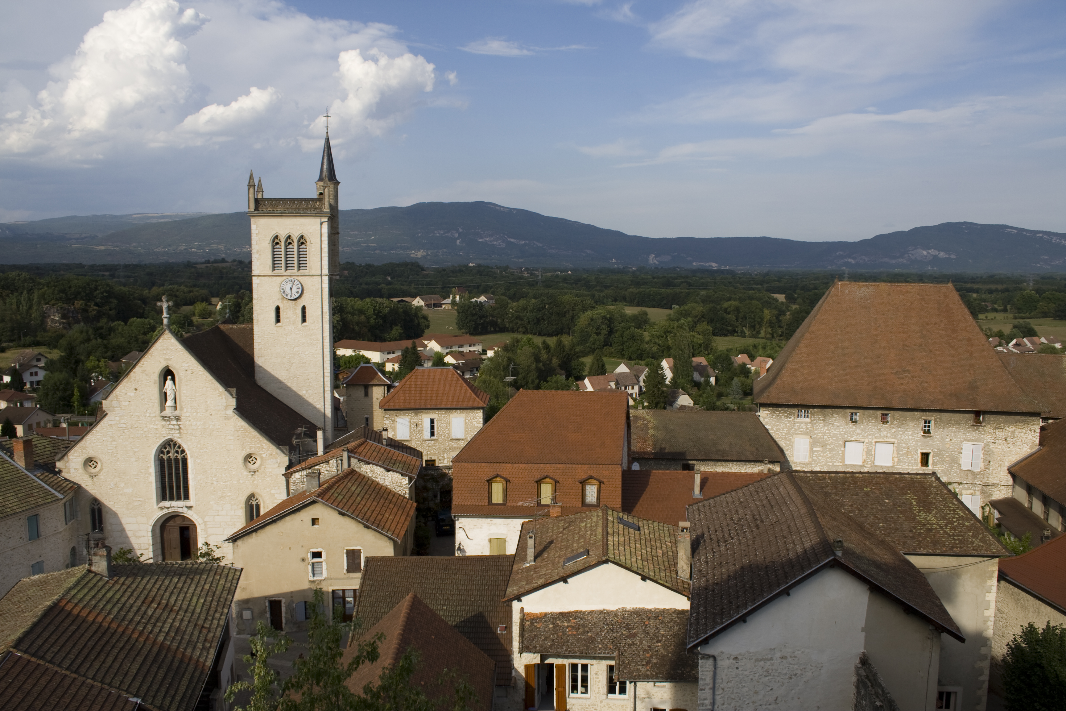 Morestel, chef-lieu de canton du département de l'Isère